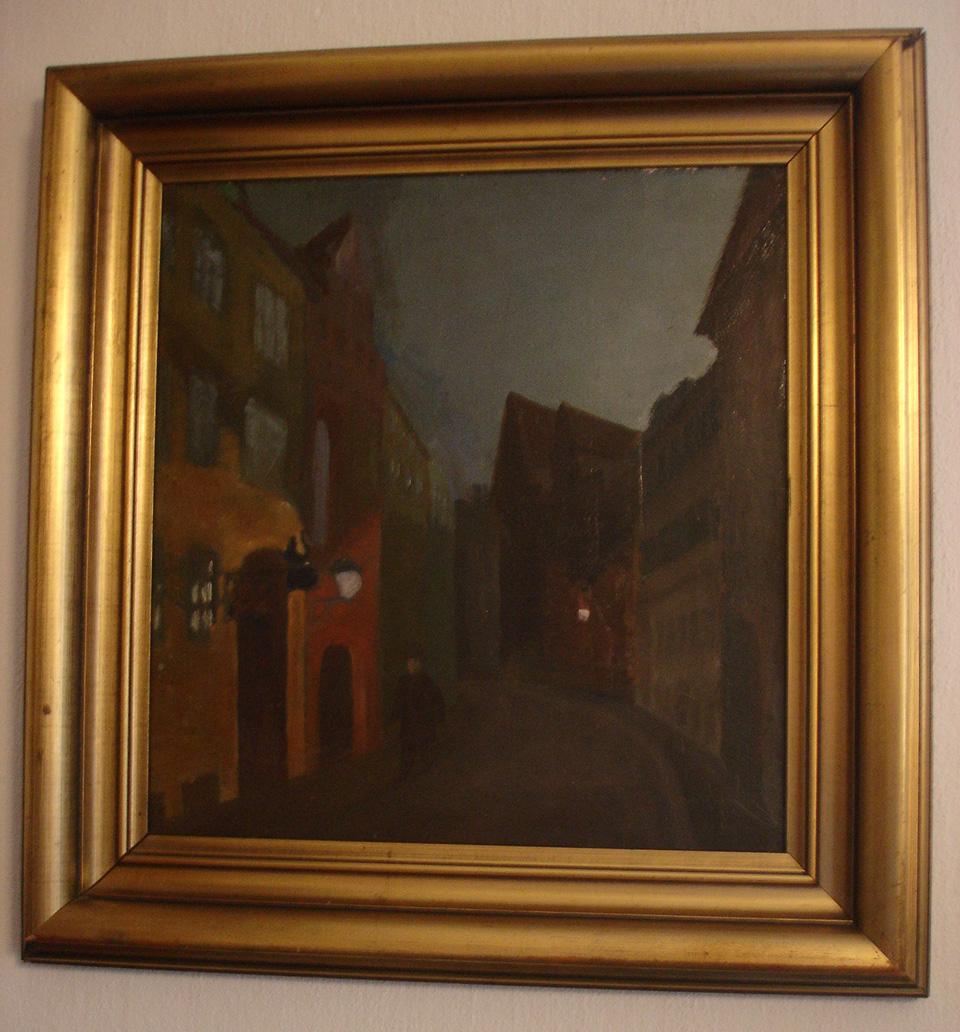 Usigneret maleri, der tilskrives den danske maler Edvard Weie (1879-1943)